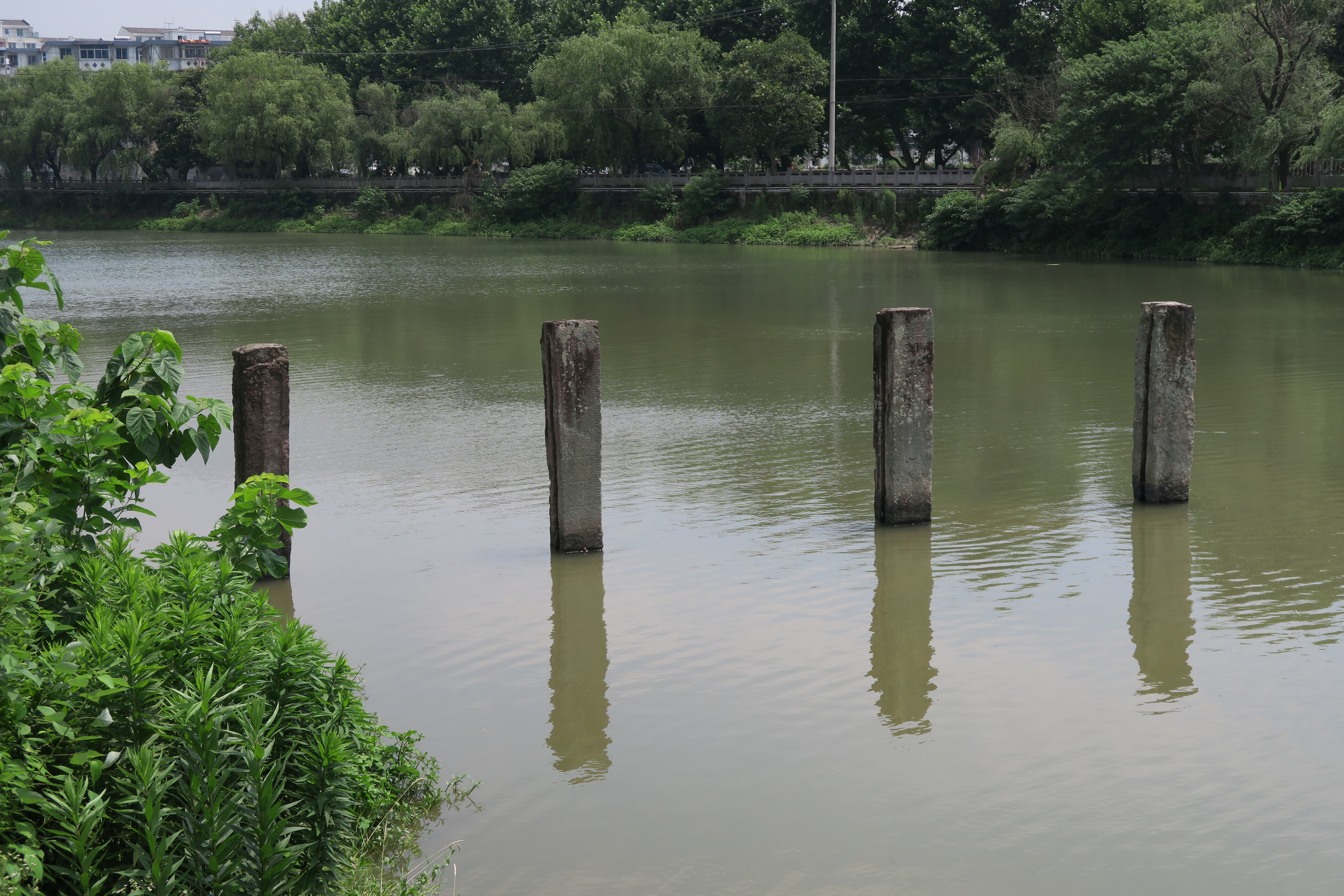 鄞江回沙闸遗址